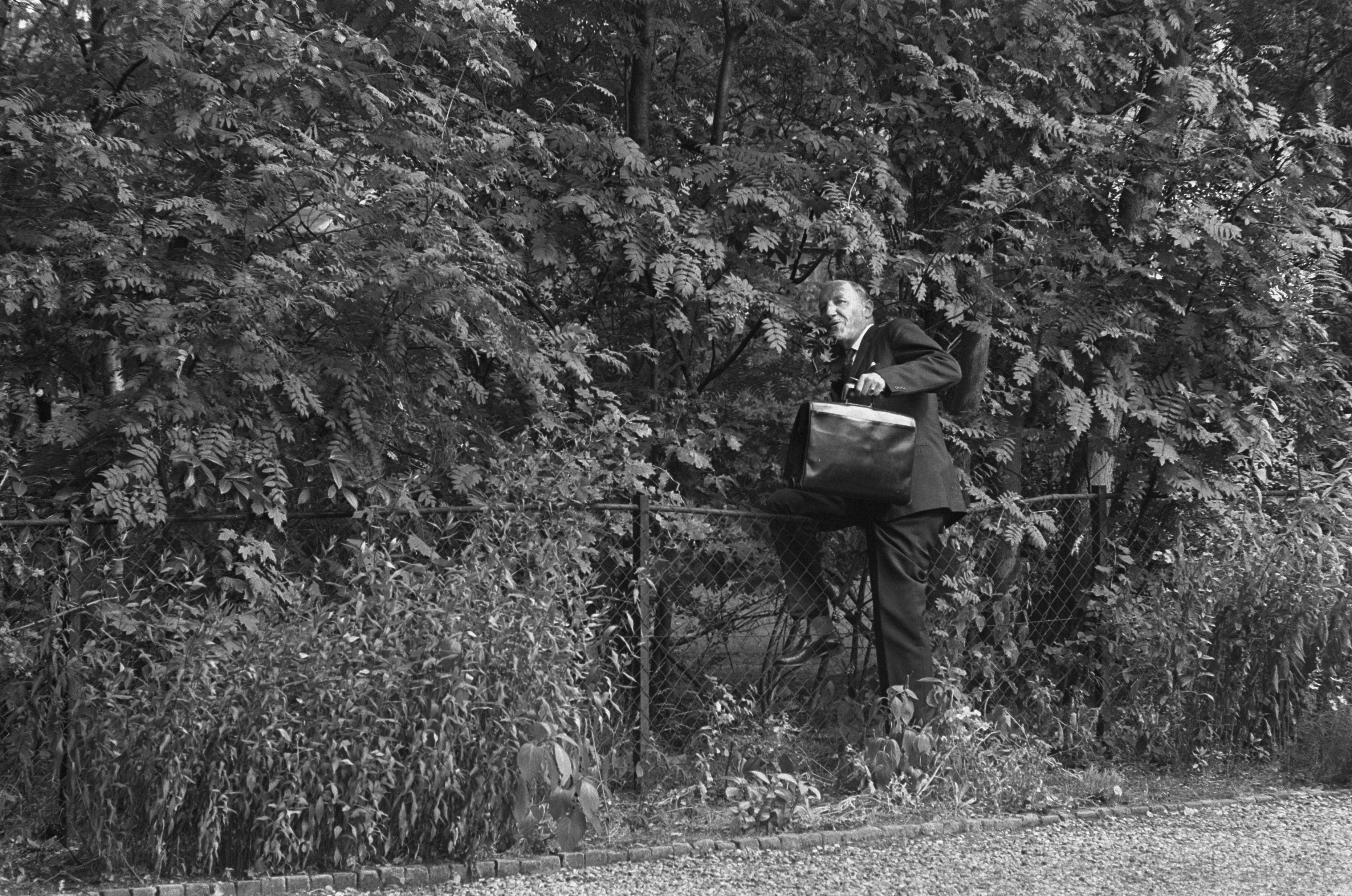 Collectie / Archief : Fotocollectie Anefo Reportage / Serie : [ onbekend ] Beschrijving : Ambonezen bezetten woning van Indonesische ambassadeur te Wassenaar; minister Luns klimt over een hek bij het verlaten van de woning Datum : 31 augustus 1970 Locatie : Wassenaar, Zuid-Holland Trefwoorden : bezettingen, hekken, ministers Persoonsnaam : Luns, Joseph Fotograaf : Mieremet, Rob / Anefo Auteursrechthebbende : Nationaal Archief Materiaalsoort : Negatief (zwart/wit) Nummer archiefinventaris : bekijk toegang 2.24.01.05 Bestanddeelnummer : 923-7985